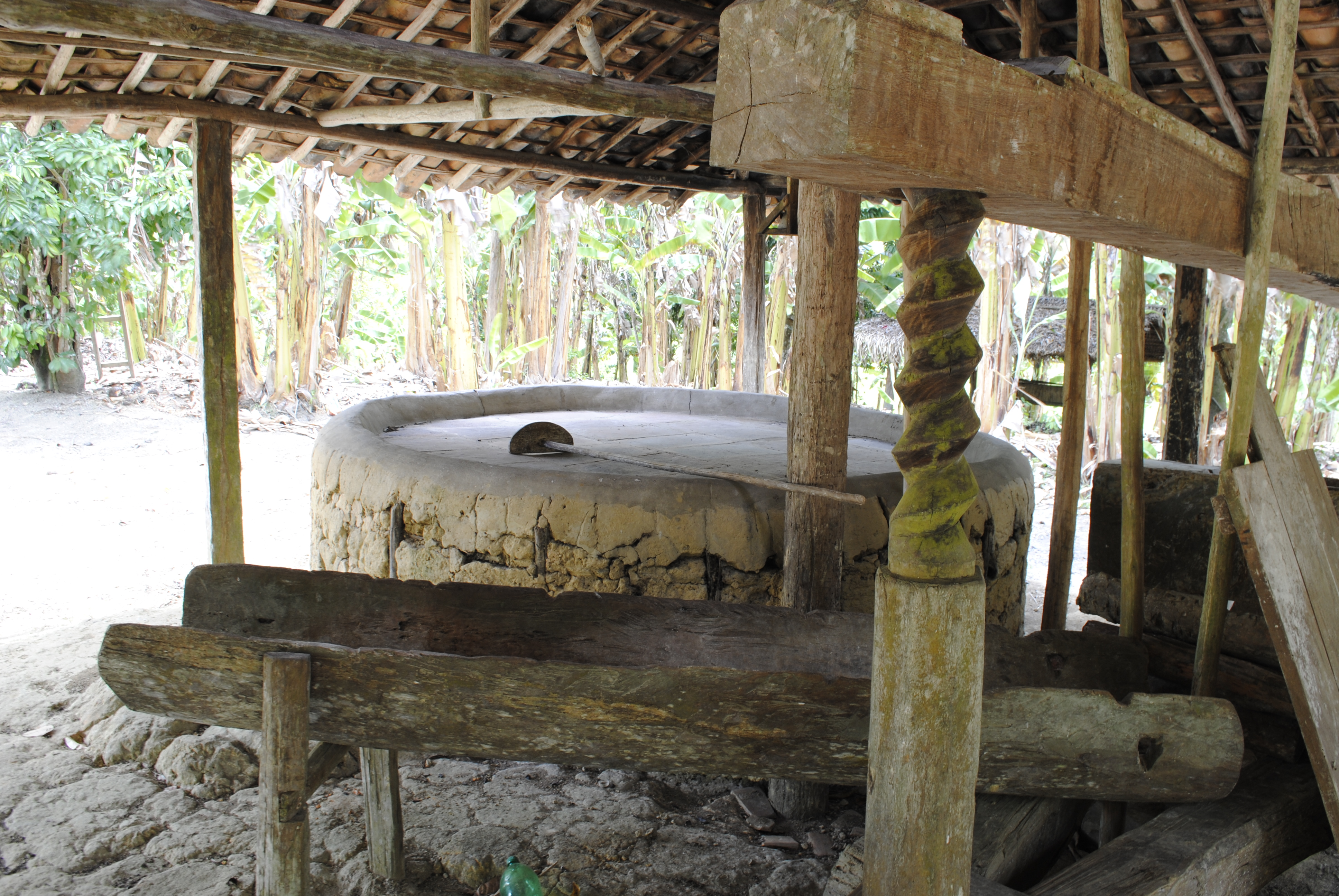 Tradicional fabrica de farinha de mandioca. Artesanal, não utiliza energia elétrica. No primeiro plano, "fuso" e "cocho". Ao fundo, forno de torrefação.